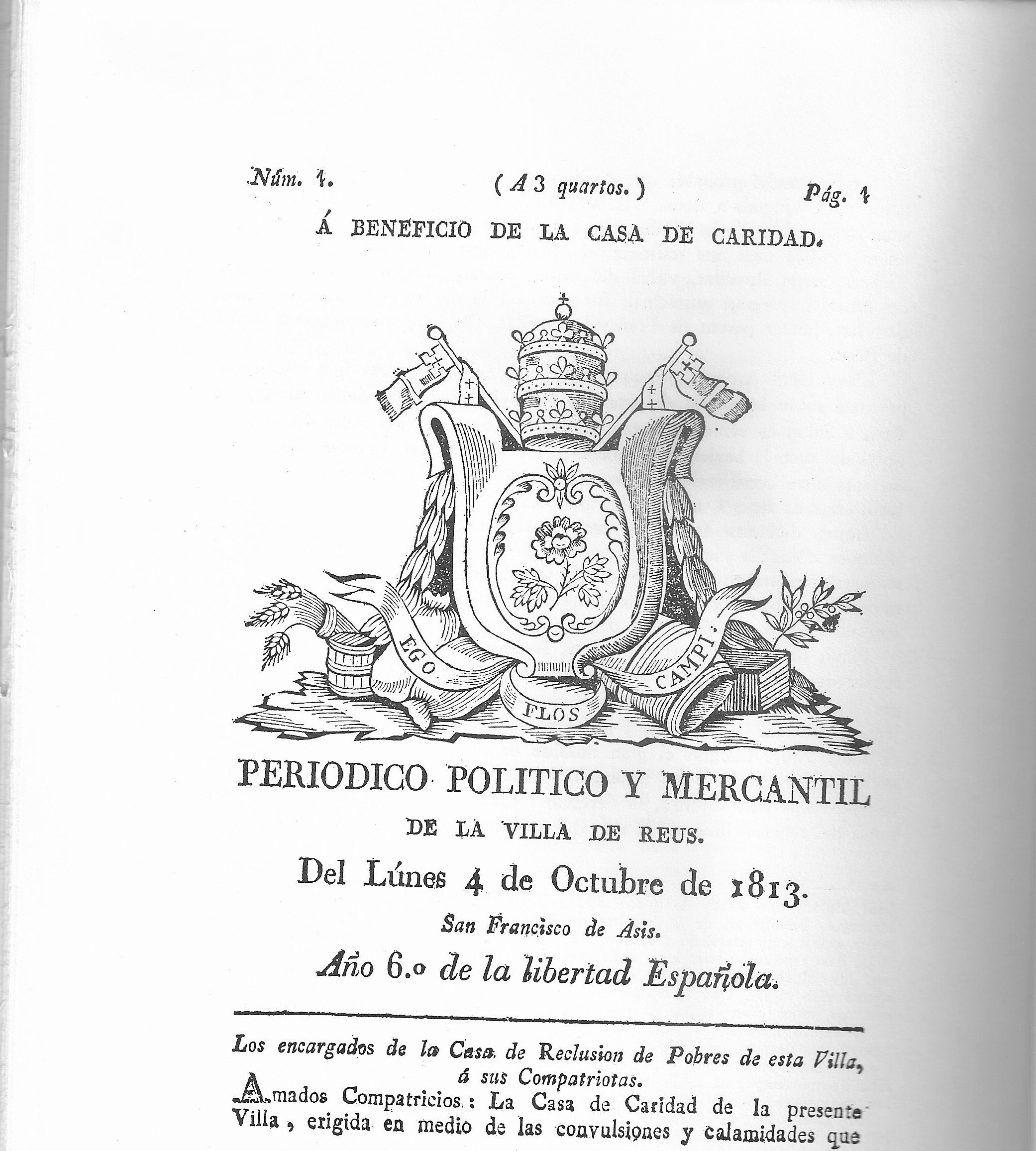 Primera pàgina del núm. 1 del Periódico Político y Mercantil de la villa de Reus